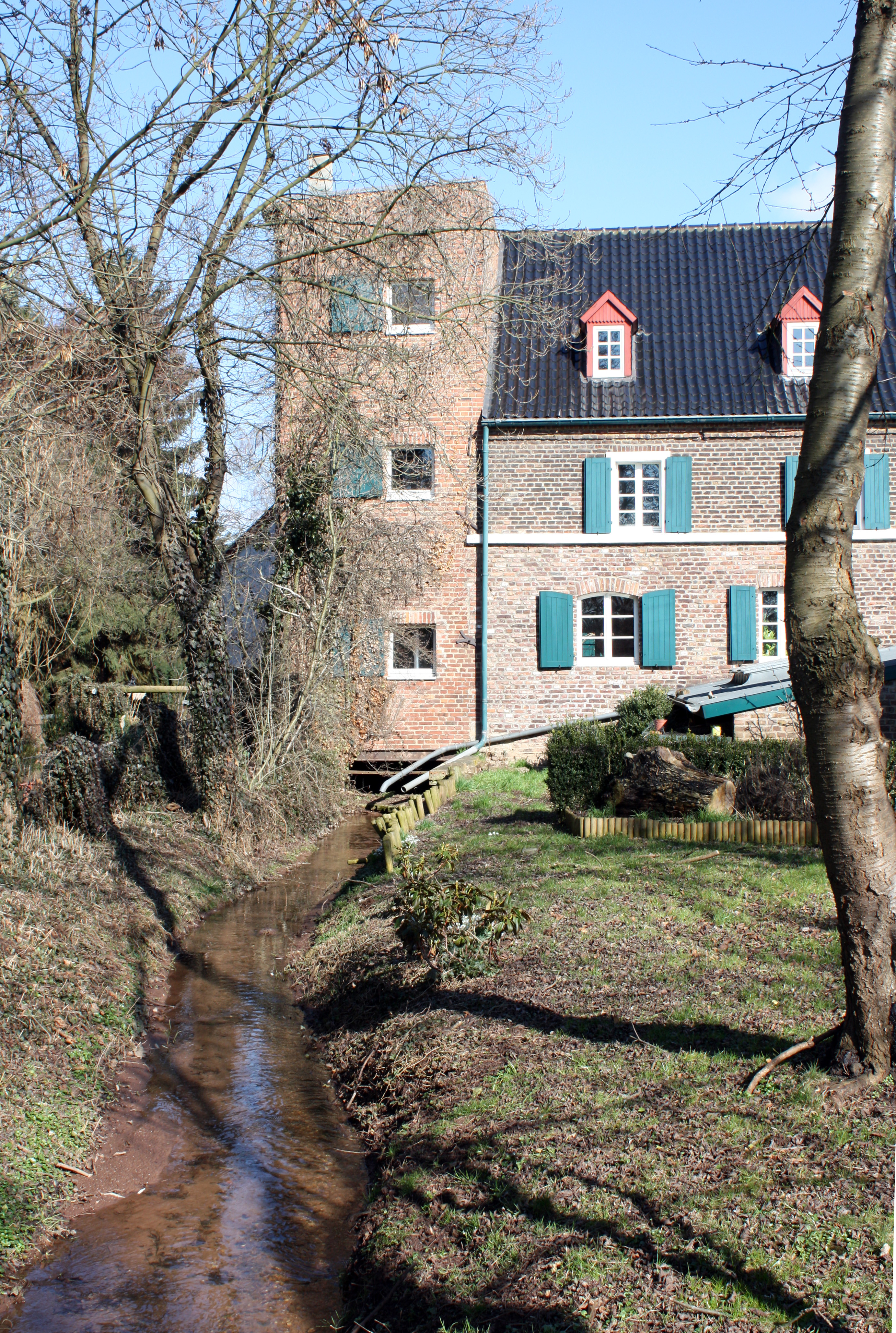 Lechenich Oebelsmühle, Mühlenbach